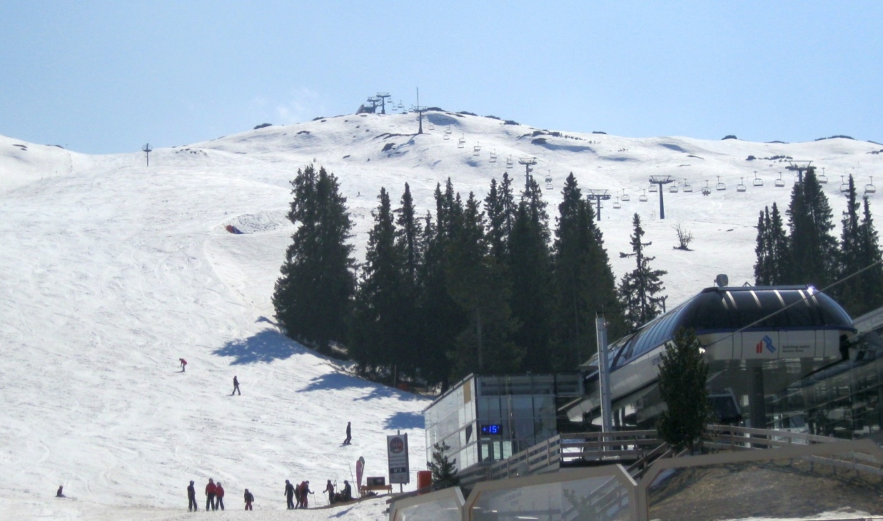 Skigebiet Ratschings-Jaufen Mittelstation